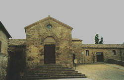 descrizione: Pieve di San Donato a Porrona nei pressi di Cinigiano (GR) lavoro personale di Vinattieri Matteo (26/01/2007) che lascia in pubblico dominio